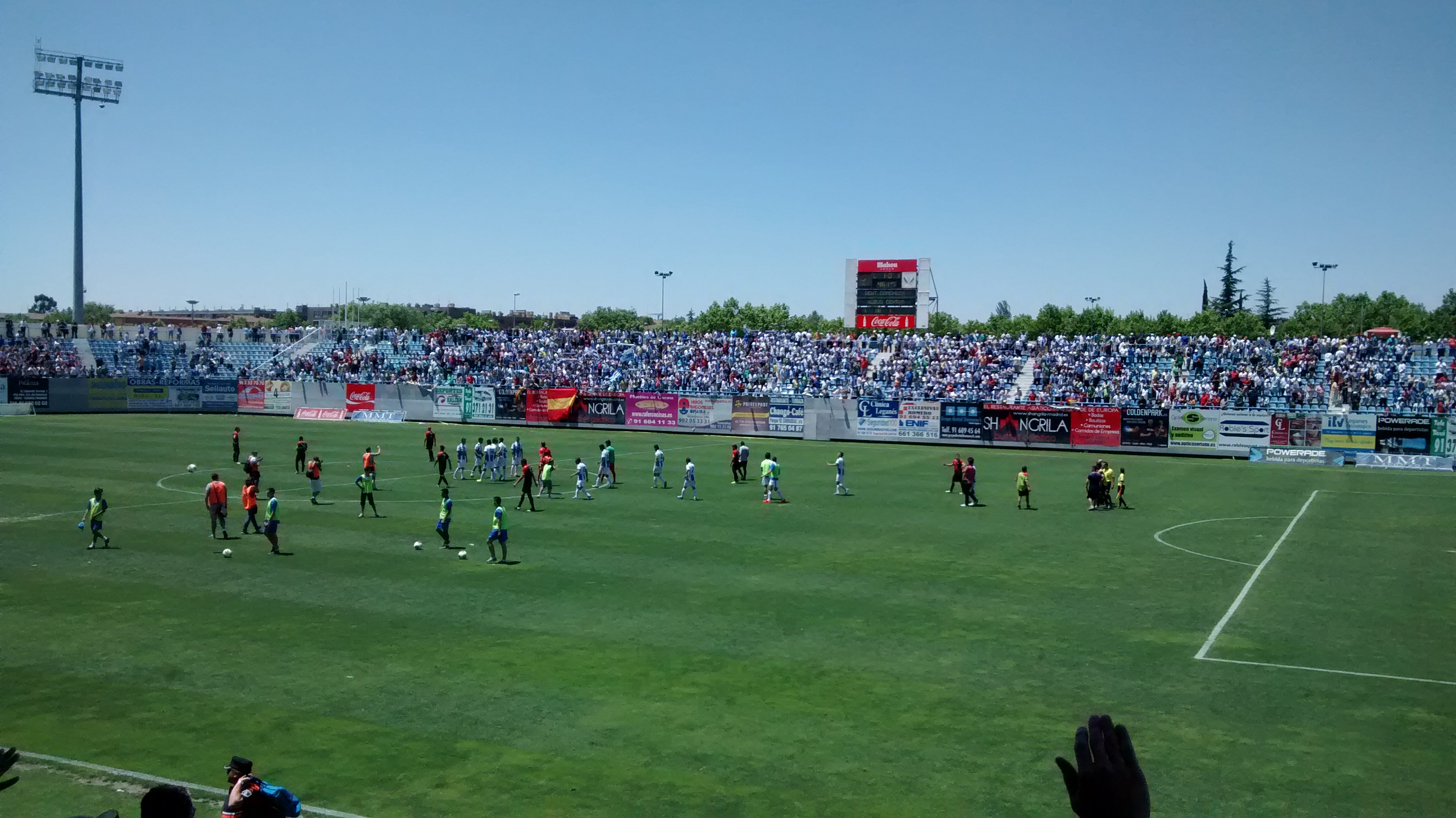 Leganés - Hospitalet final play off 2014